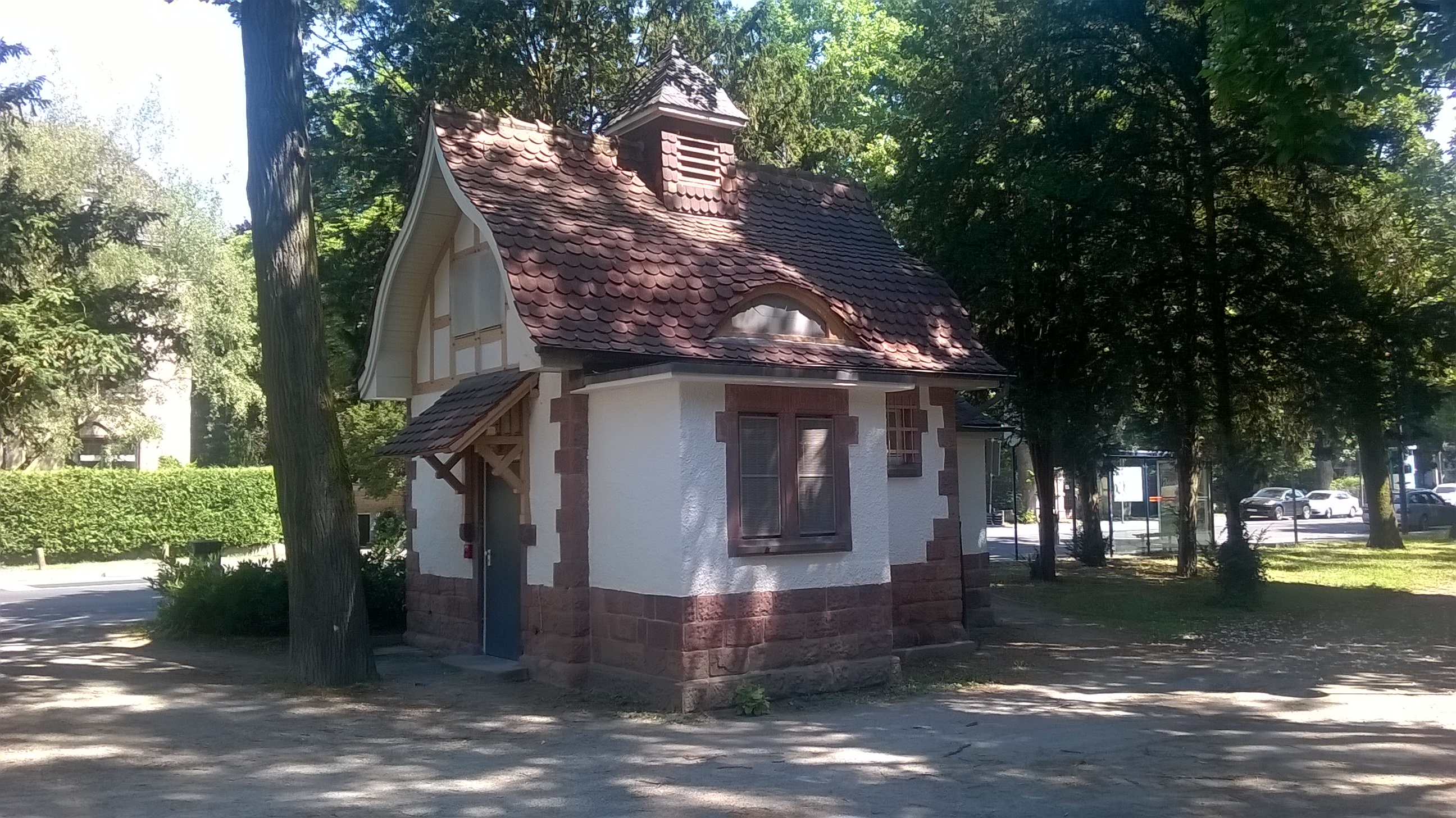 Ehemaliges Toilettenhäuschen, denkmalgeschützt